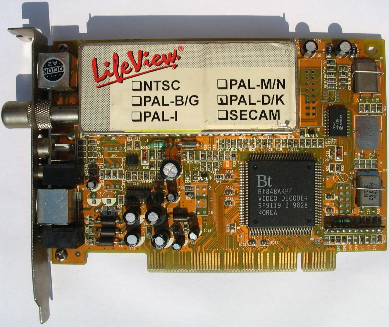 Karta telewizyjna Lifeview na czipsecie bt848